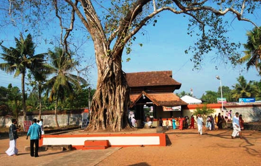 മാന്നാർ മഹാദേവക്ഷേത്രം - കിഴക്കേ ഗോപുരം, മാന്നാർ, മാവേലിക്കര